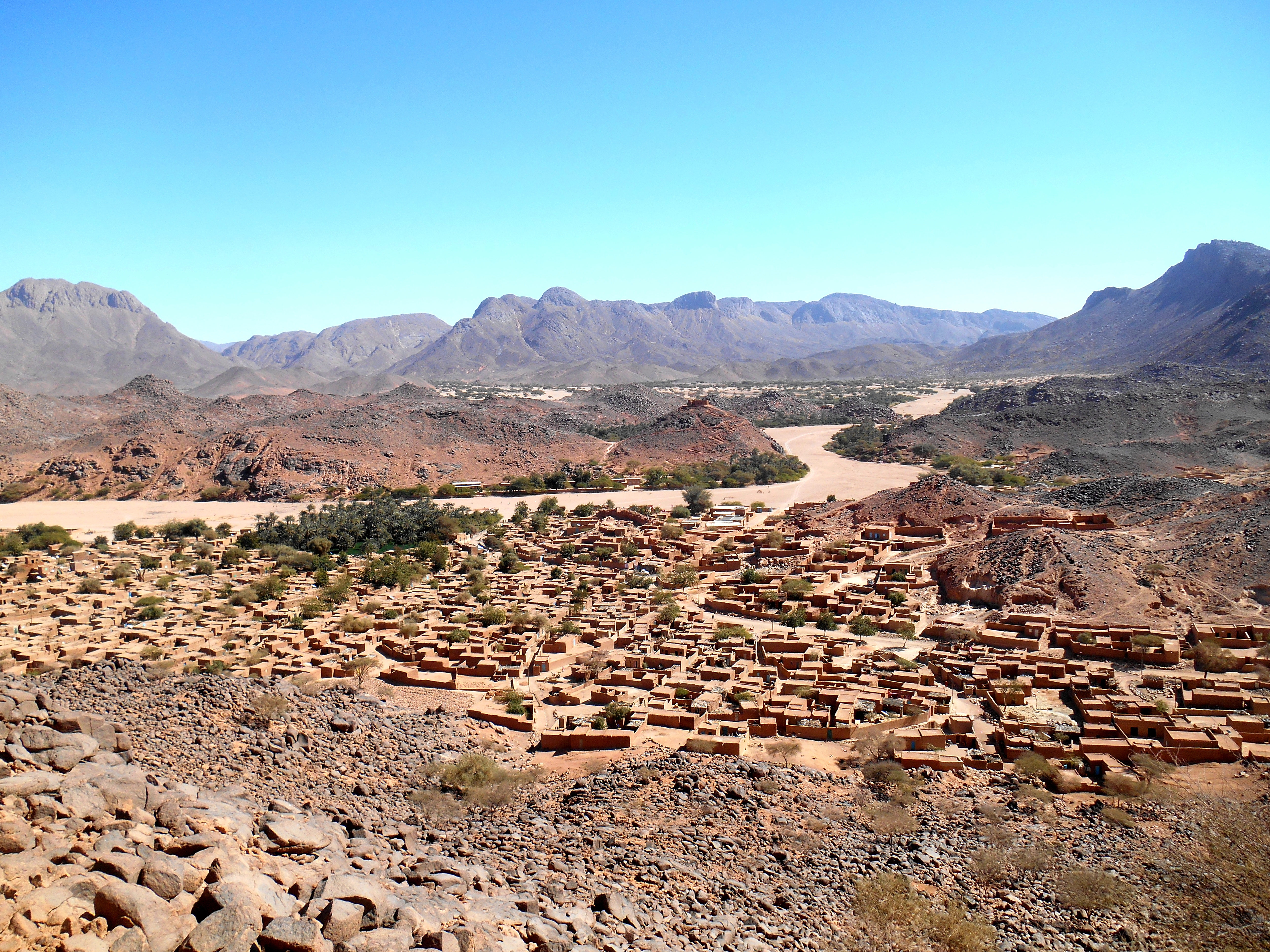 Le village de timia